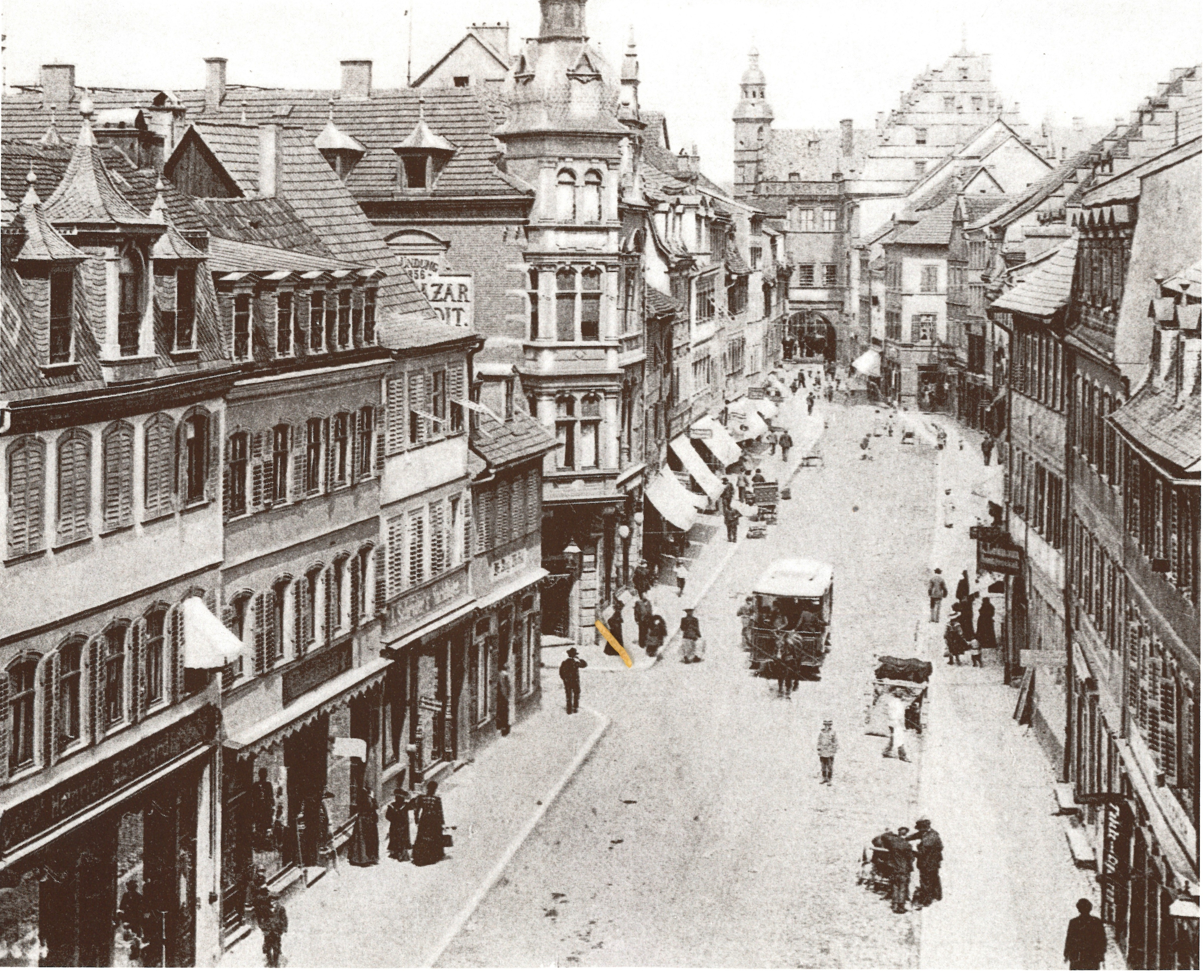 Schweinfurt Fotografie nach 1896: Spitalstraße mit Blick auf das Rathaus mit Pferdebahn